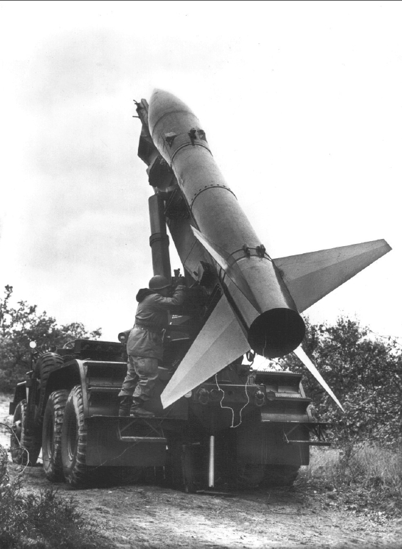 A West German MGR-1 Honest John, in 1960.